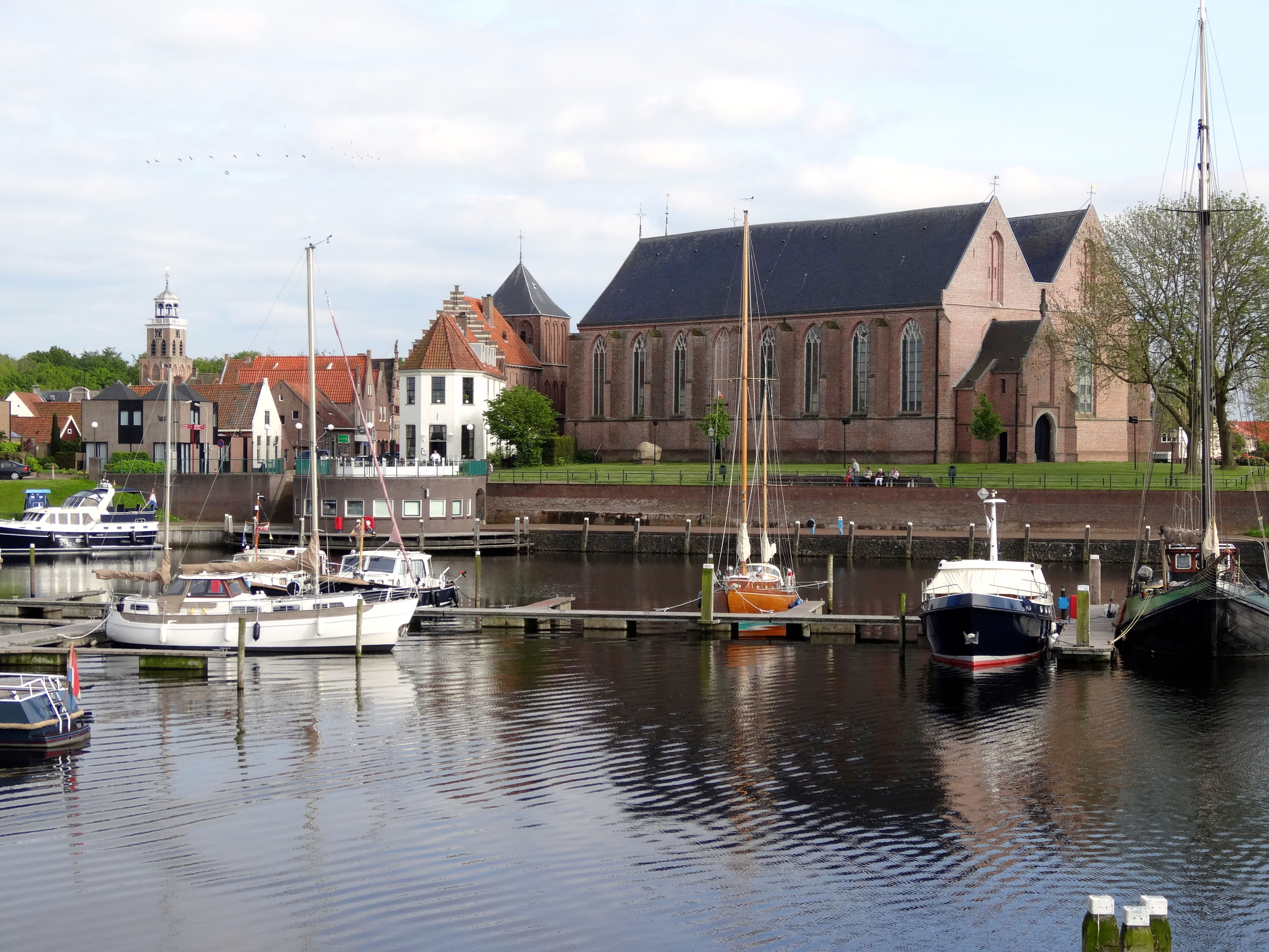 Zicht op Vollenhove met de Grote of Sint-Nicolaaskerk (rechts) en de Kleine of Onze-Lieve-Vrouwekerk (links) en de jachthaven (voorgrond)